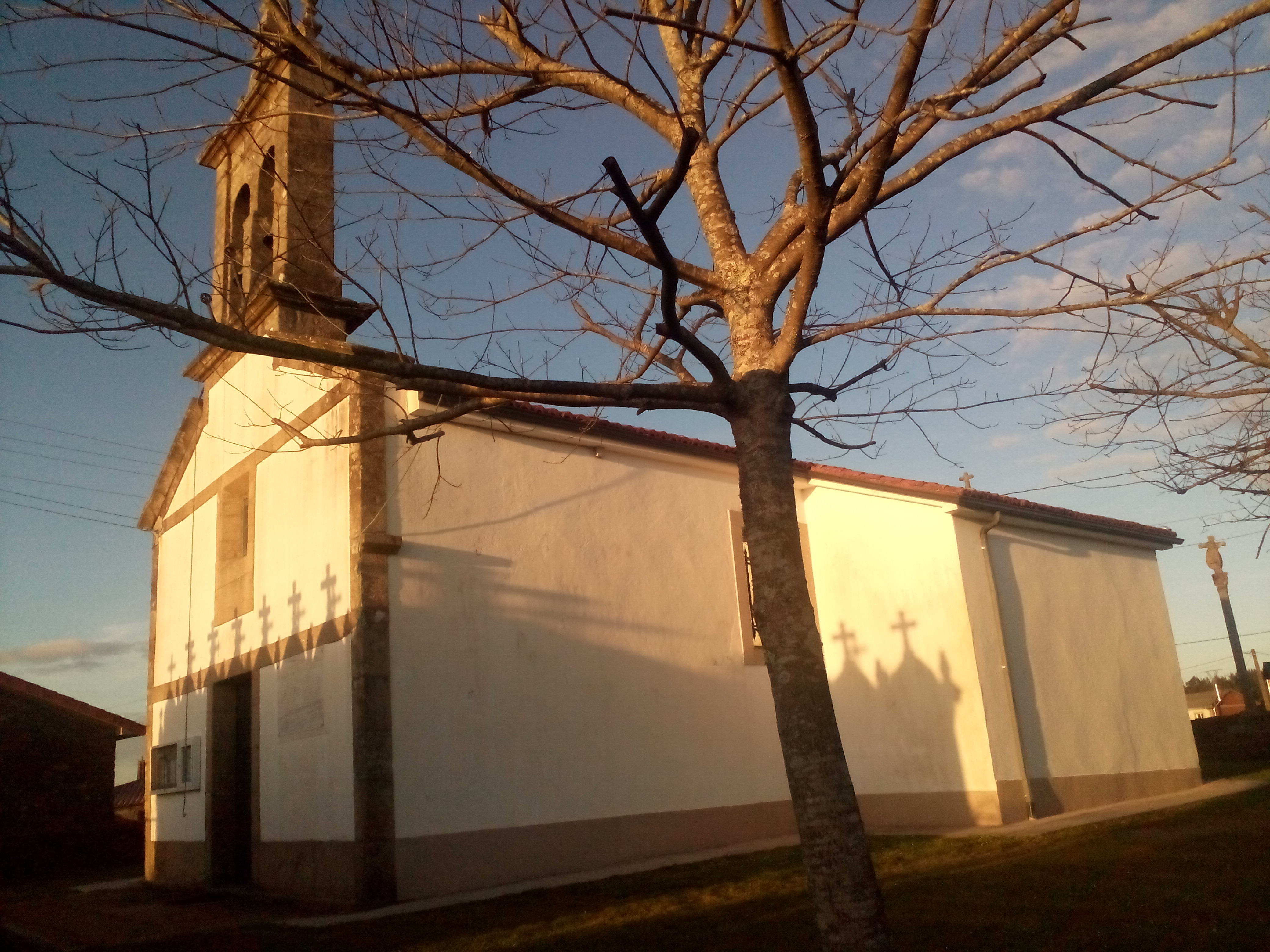 es una imágen de la iglesia de San Martiño de Oroso